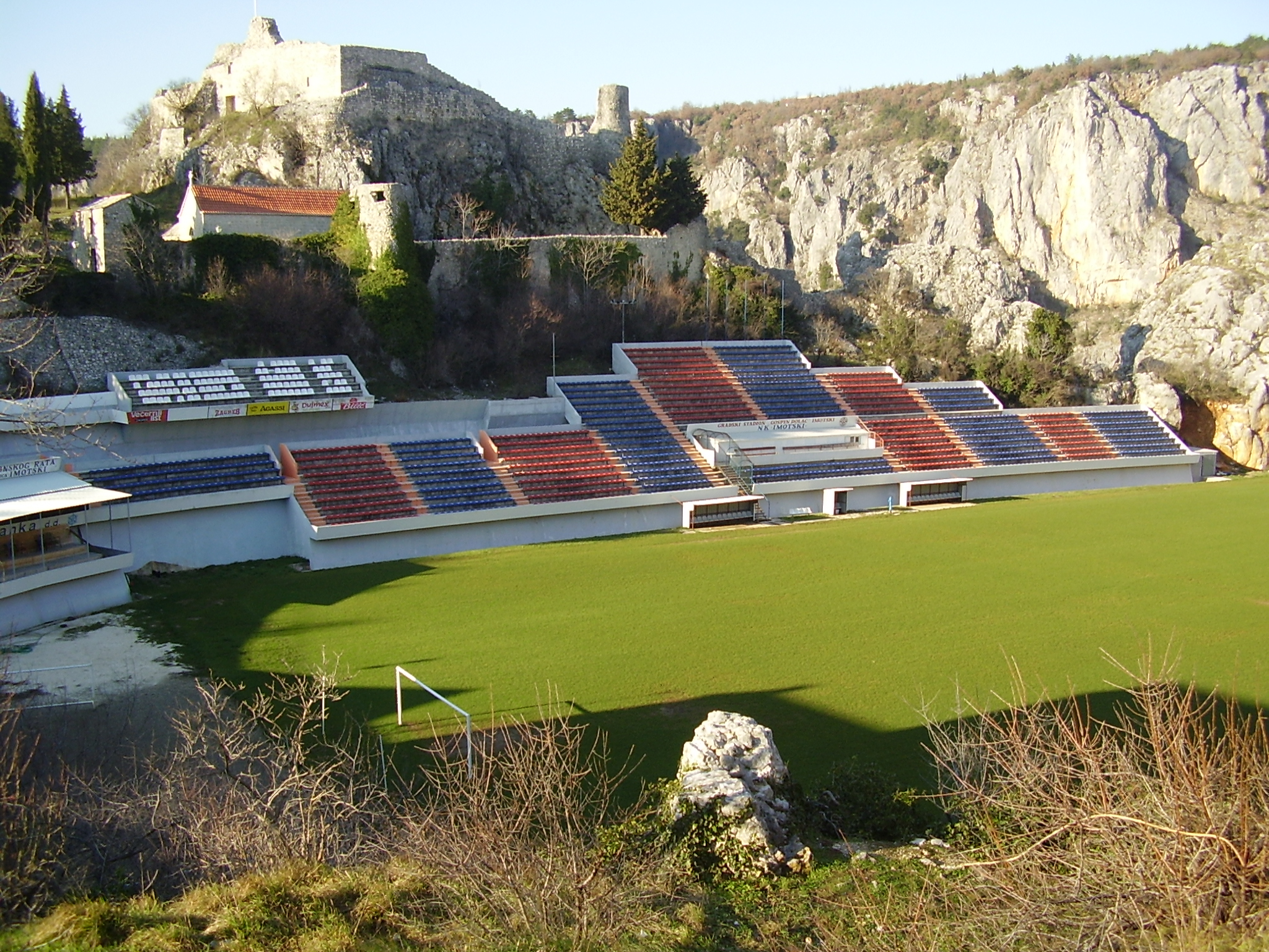 STadion NK Imotskog, Gospin dolac